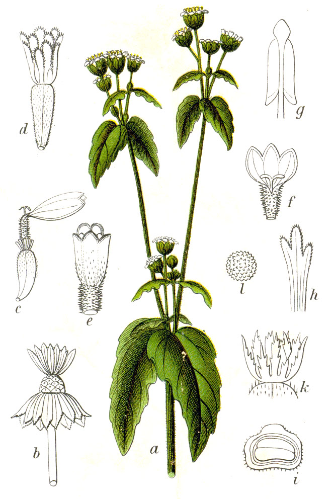 Galinsoga parviflora Cav. Original Caption Gewöhnliche Galinsoga, Galinsoga parviflora